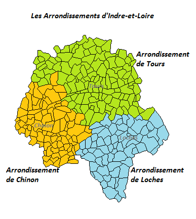 Carte des arrondissements d'Indre-et-Loire